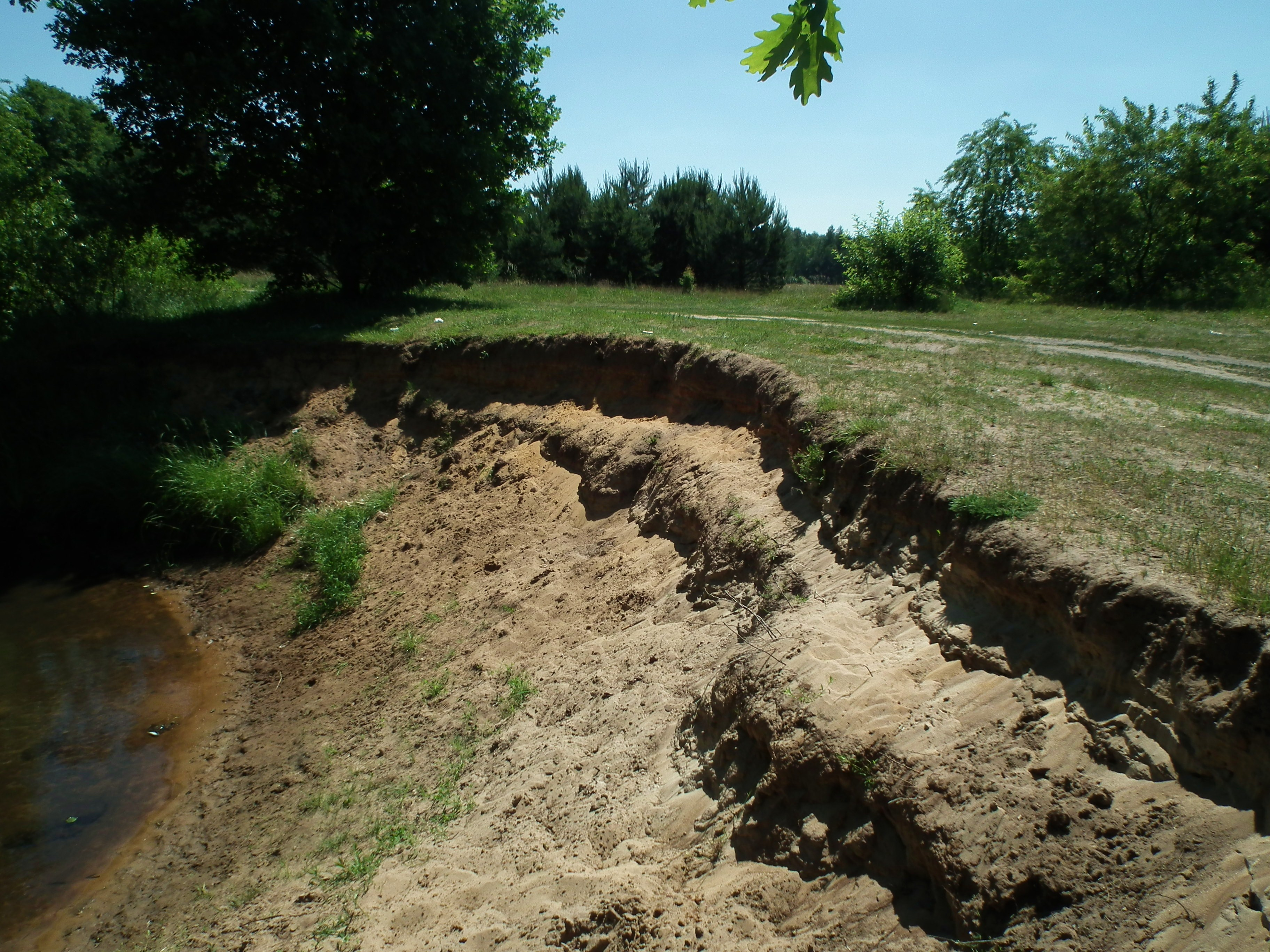 Rzeka Grabia w rejonie Kolumny i wsi Baryczy.